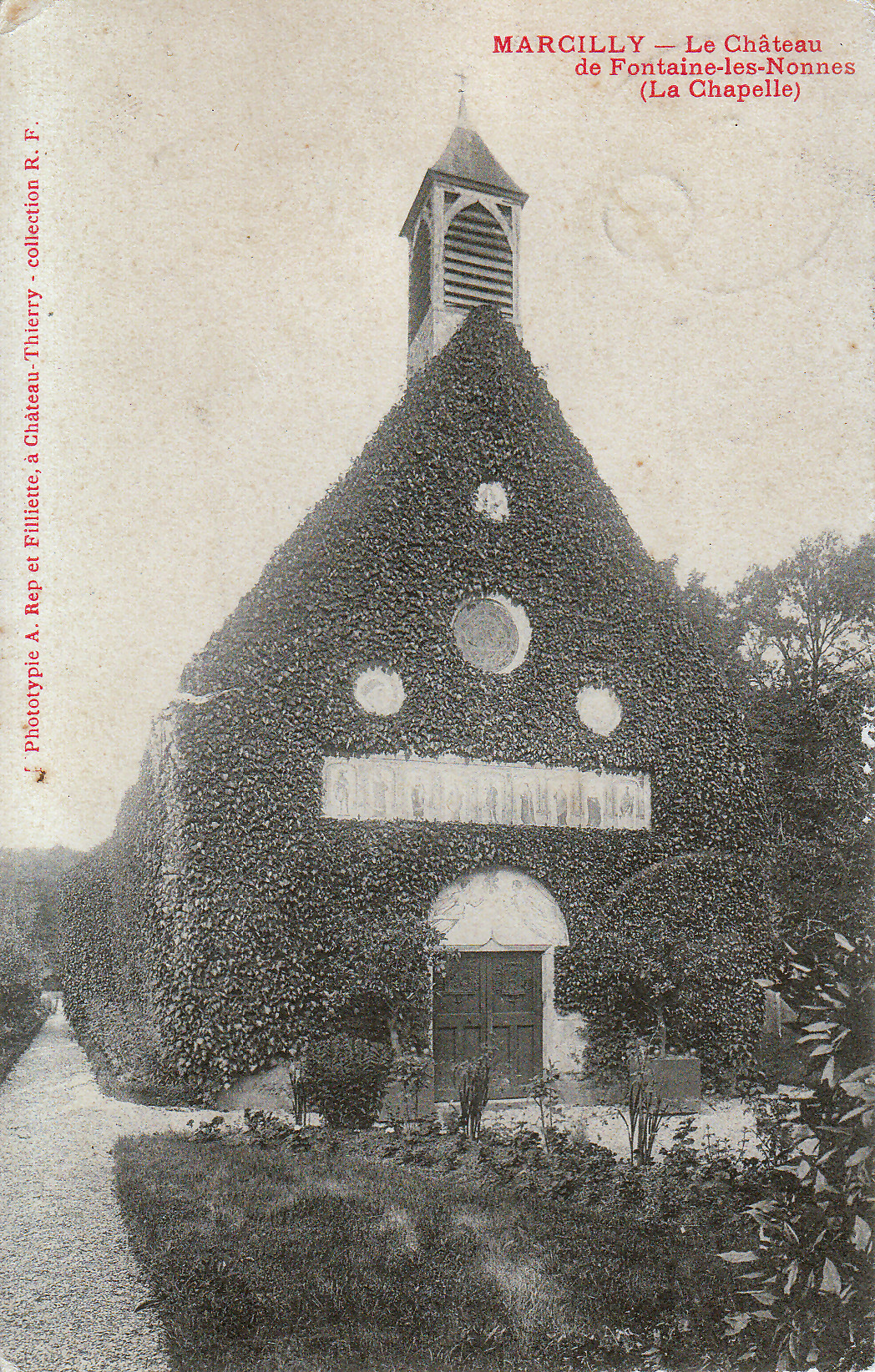 Chapelle de Fontaine-les-Nonnes, fronton intéressant